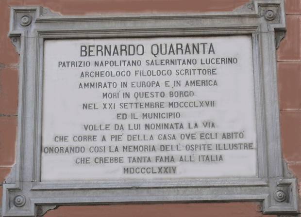 commemorazione